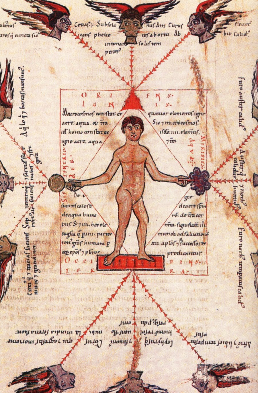 Vientos, elementos, temperamentos, miniatura del Manuscrito astronómico, Baviera, siglo XII.